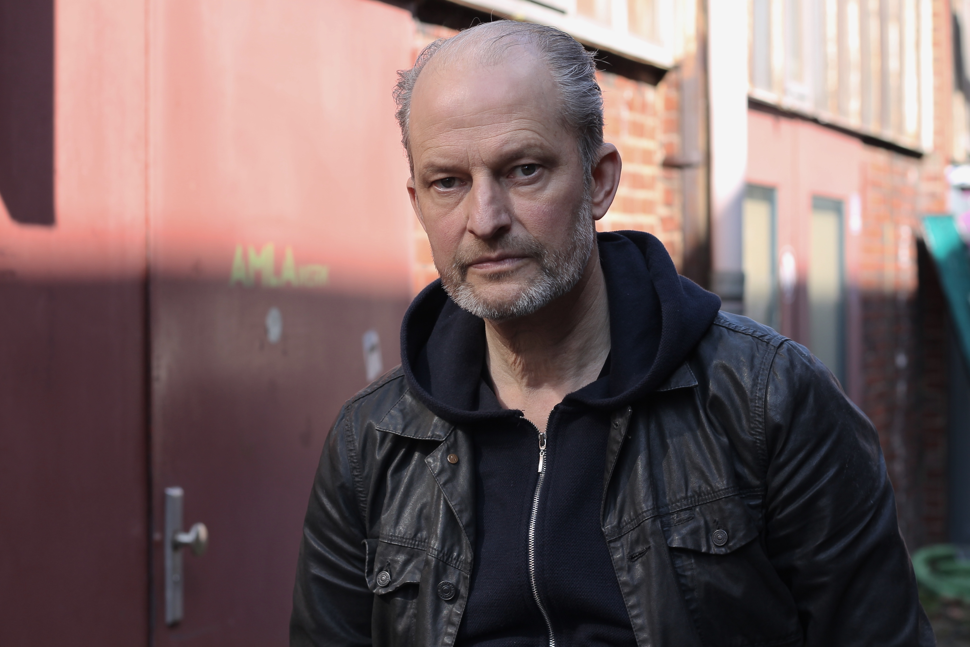 Portrait